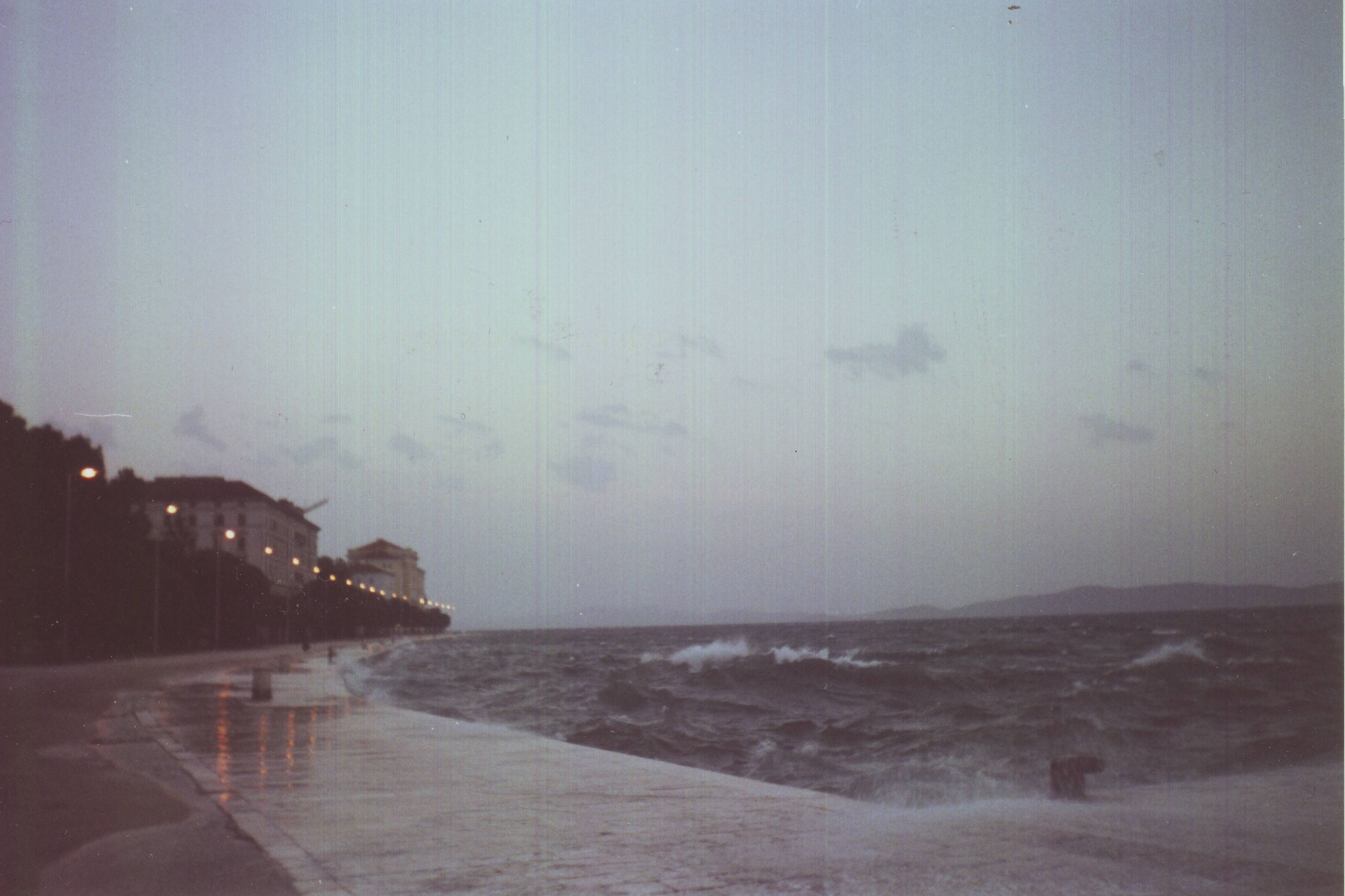 Južni vjetar na Zadarskoj rivi